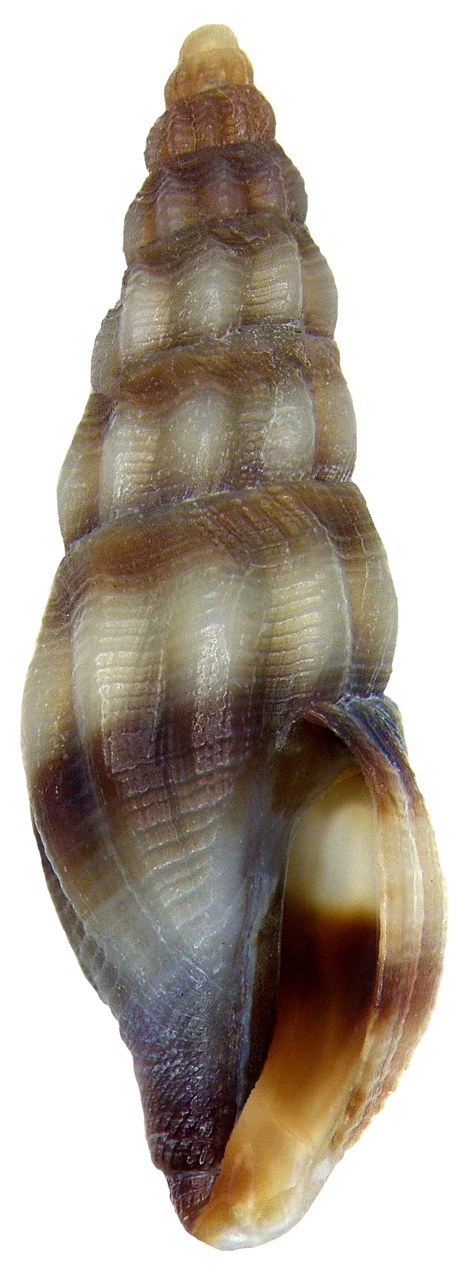 Bela zonata (Locard, 1892) (synonym: Bela laevigata (Philippi, 1836)), Familie: Turridae Groesse: 9 x 3 mm Verbreitung: Mittelmeer; Fundort: Italien, Adria, Caorle; leg.det. U.Schmidt, 1985; Photo: U.Schmidt, 2008